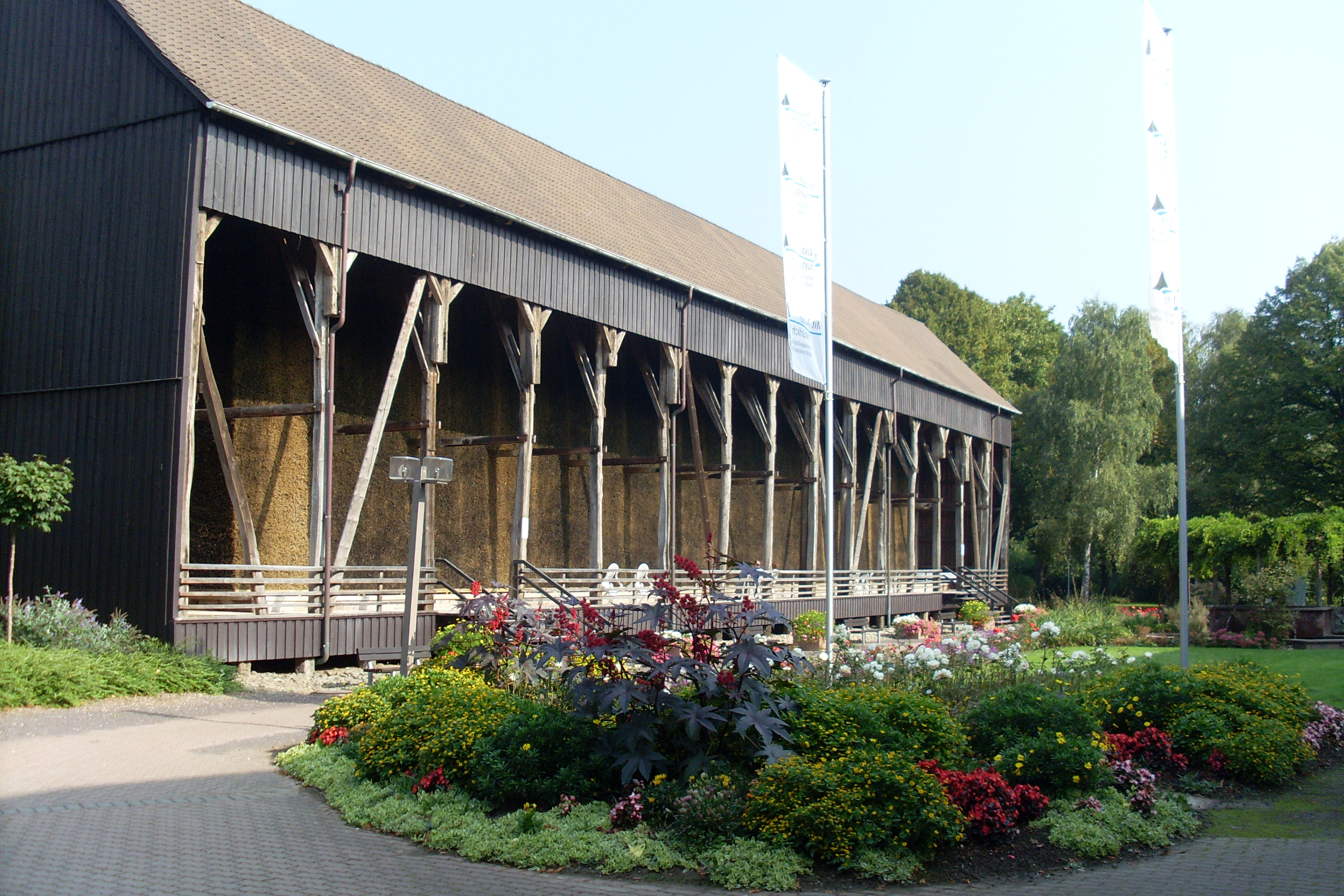 Gradierwerk im Kurpark Bad Salzdetfurth